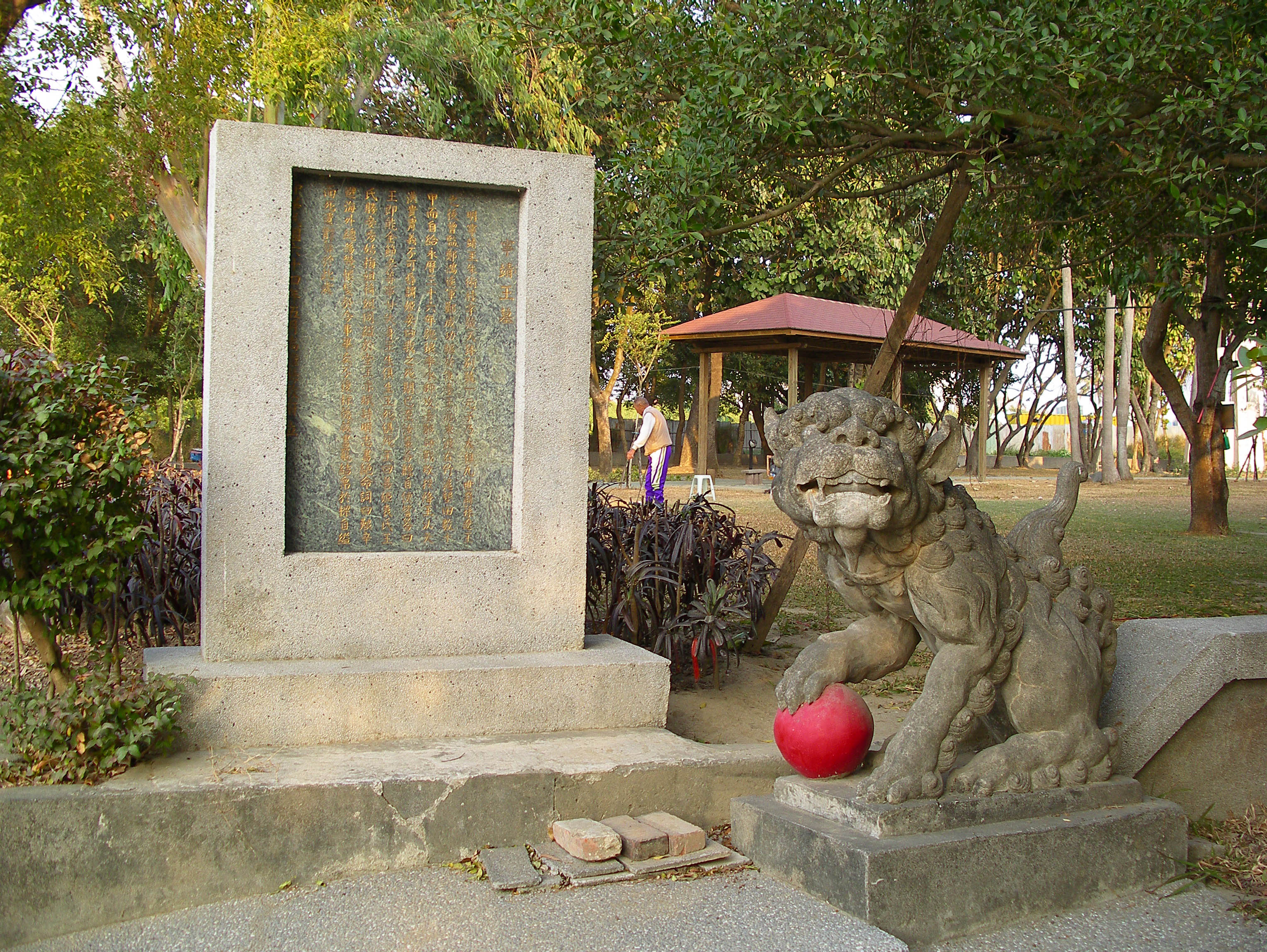 高雄縣政府所立的寧靖王墓碑